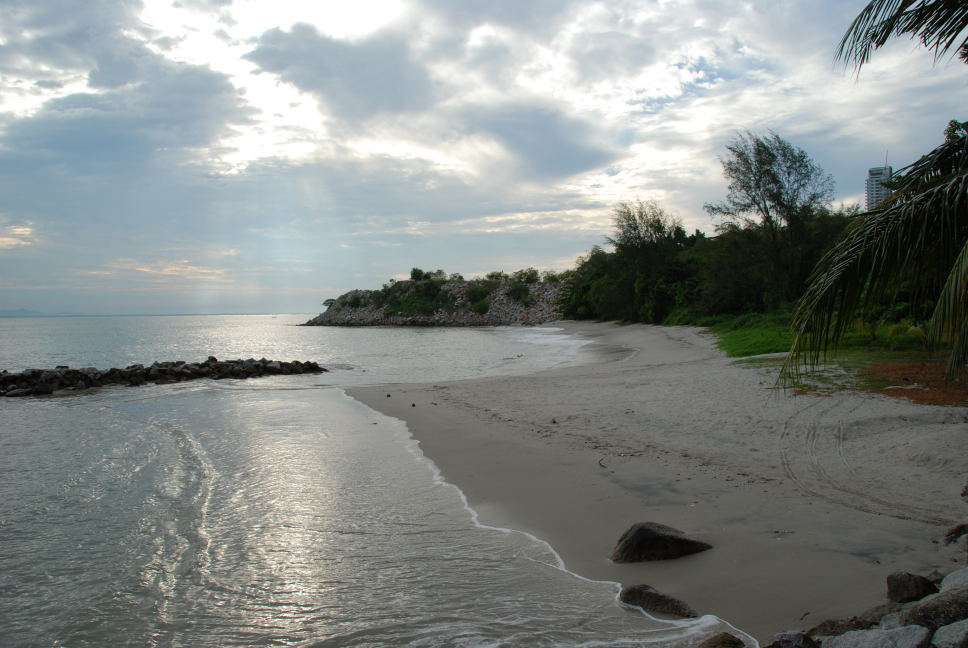 Taman Tanjung Bunga, Tanjung Bungah, Pulau Pinang, Malaysia